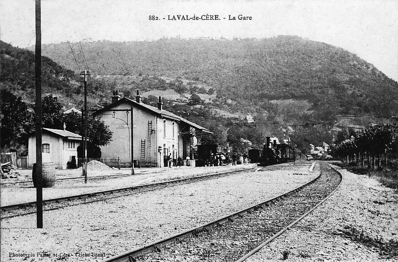 Intérieur de la gare de Laval-de-Cère vers 1900.